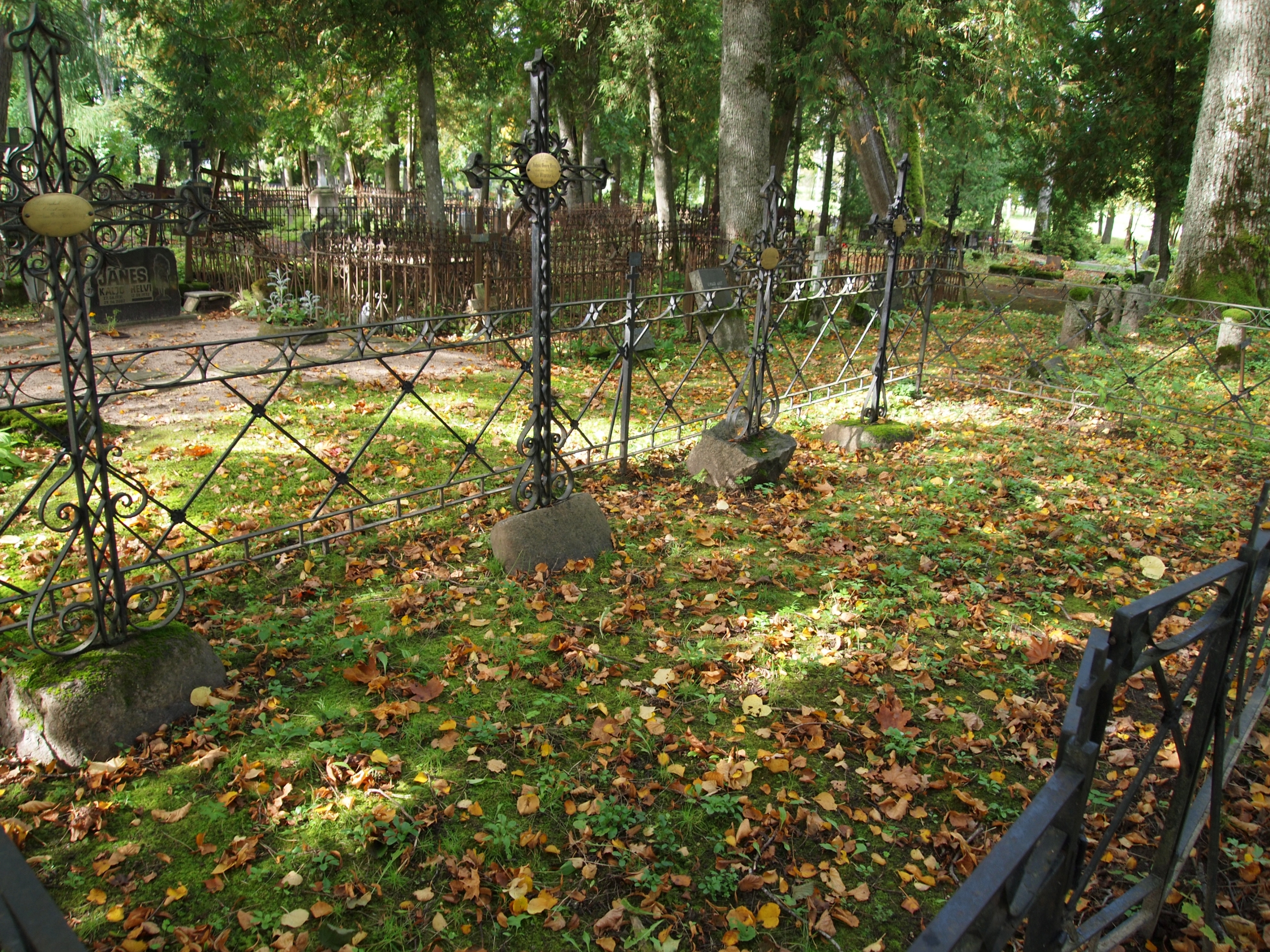 Gunderstrupide perekonna hauaplats Reopalu kalmistul. Vasakult esimene on polkovnik Carl von Gunderstrupi (1812–1888) ning vasakult teine Juuru pastori ja Ida-Harju praosti Johann Georg Bergi (1817–1878) ja tema abikaasa Elwine (sünd. Gunderstrup) hauatähis.